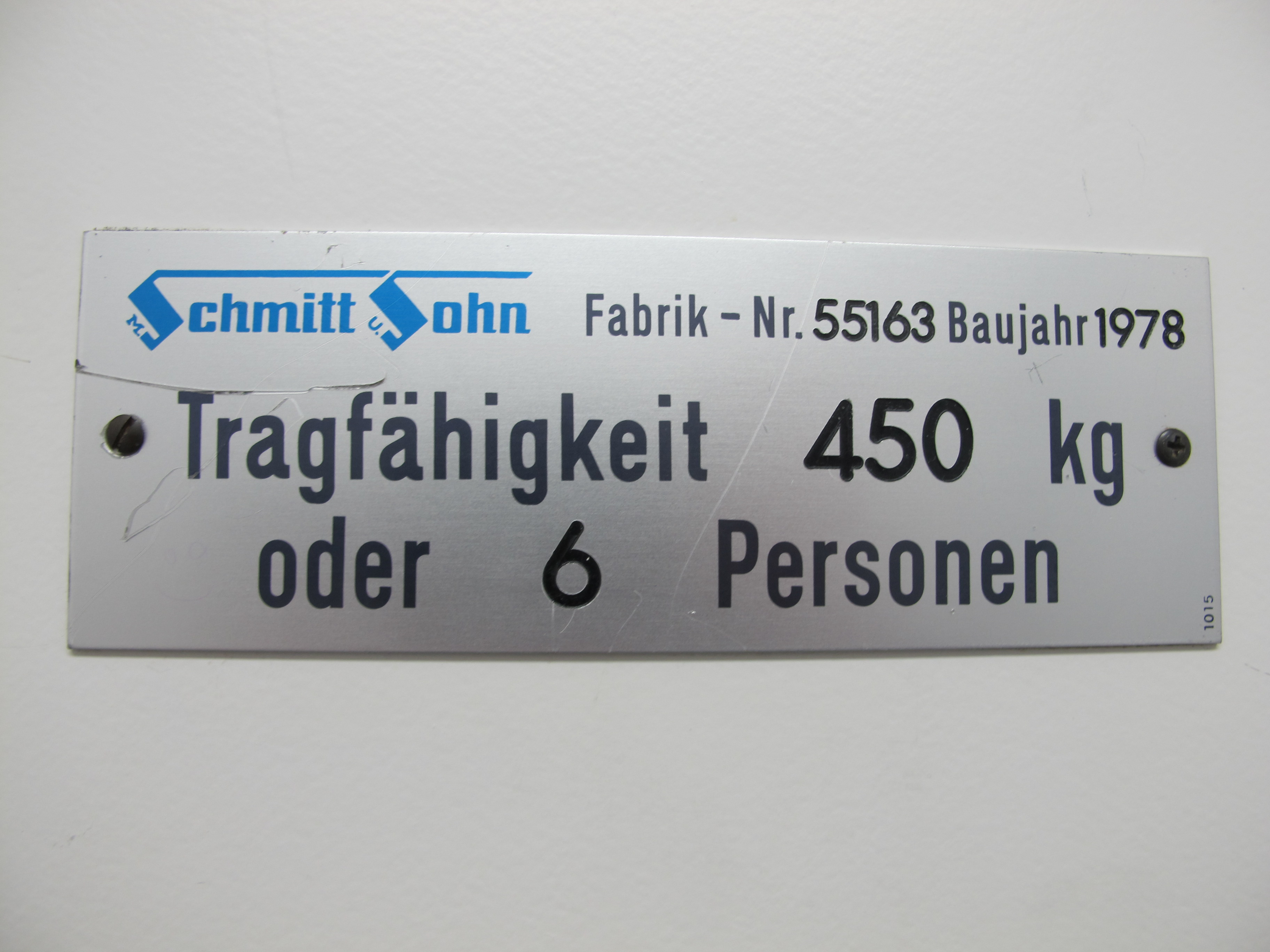 Firmenschild mit Angabe der Maximalladung in einem Aufzug im Bildungshaus Reimlingen